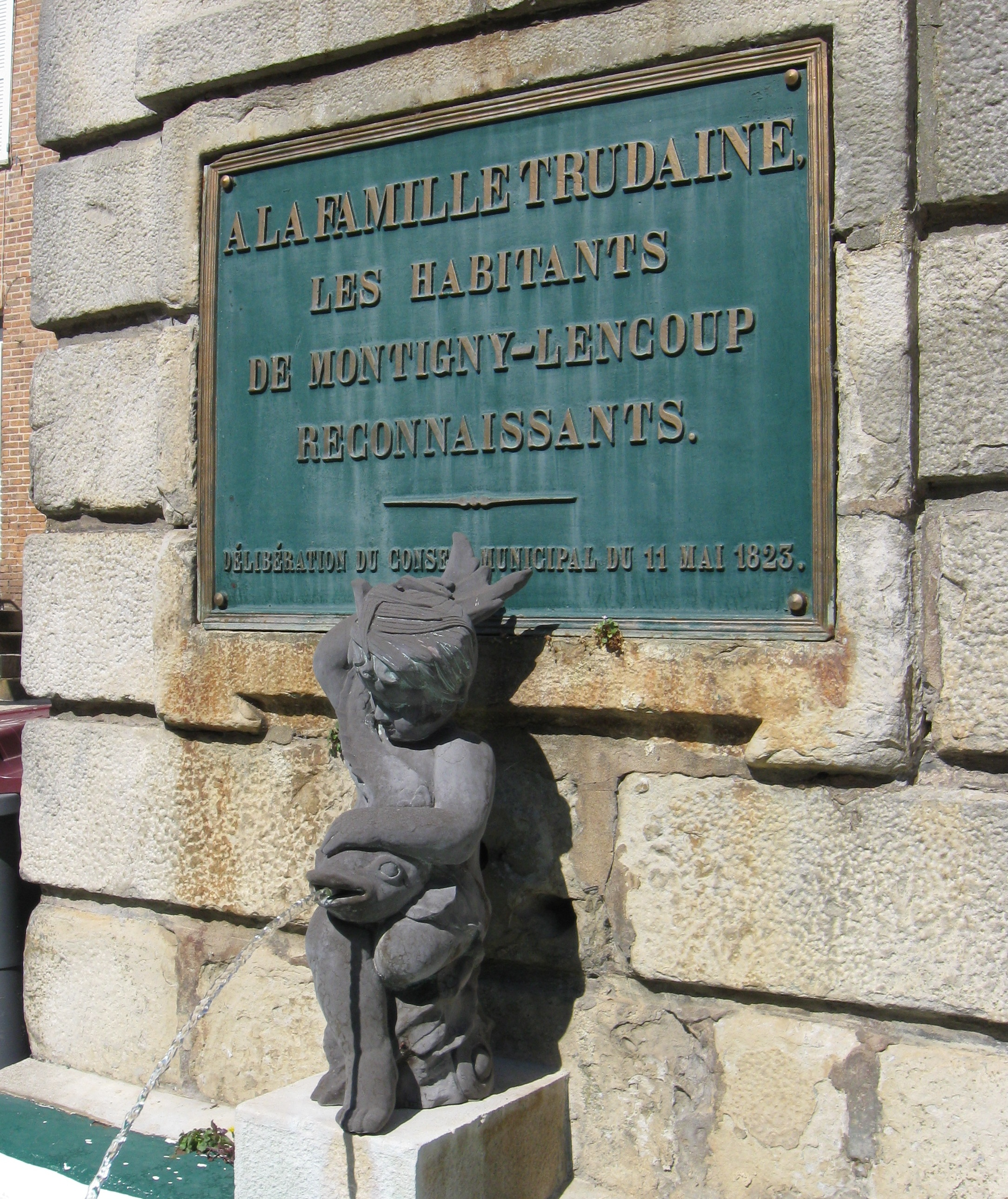 Fontaine à Montigny-Lencoup. (Seine-et-Marne, région Île-de-France) : « À la famille Trudaine, les habitants de Montigny-Lencoup reconnaissants. Délibération du conseil municipal du 11 mai 1823. »